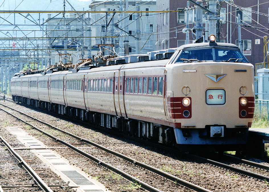 JR東日本 485系特急形電車 急行 津軽 弘前駅にて